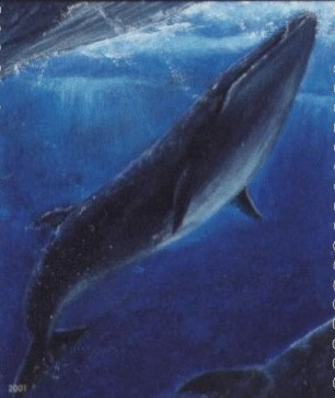 Sei Whale